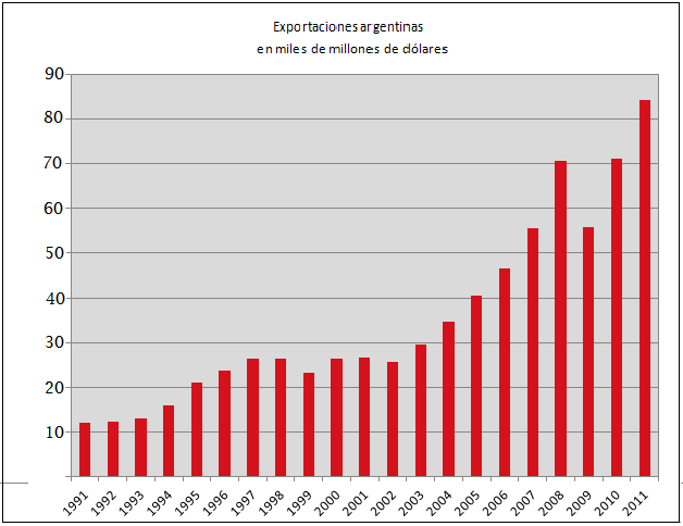 Argentina. Exportaciones (Exports) 1991-2011. Graphic.